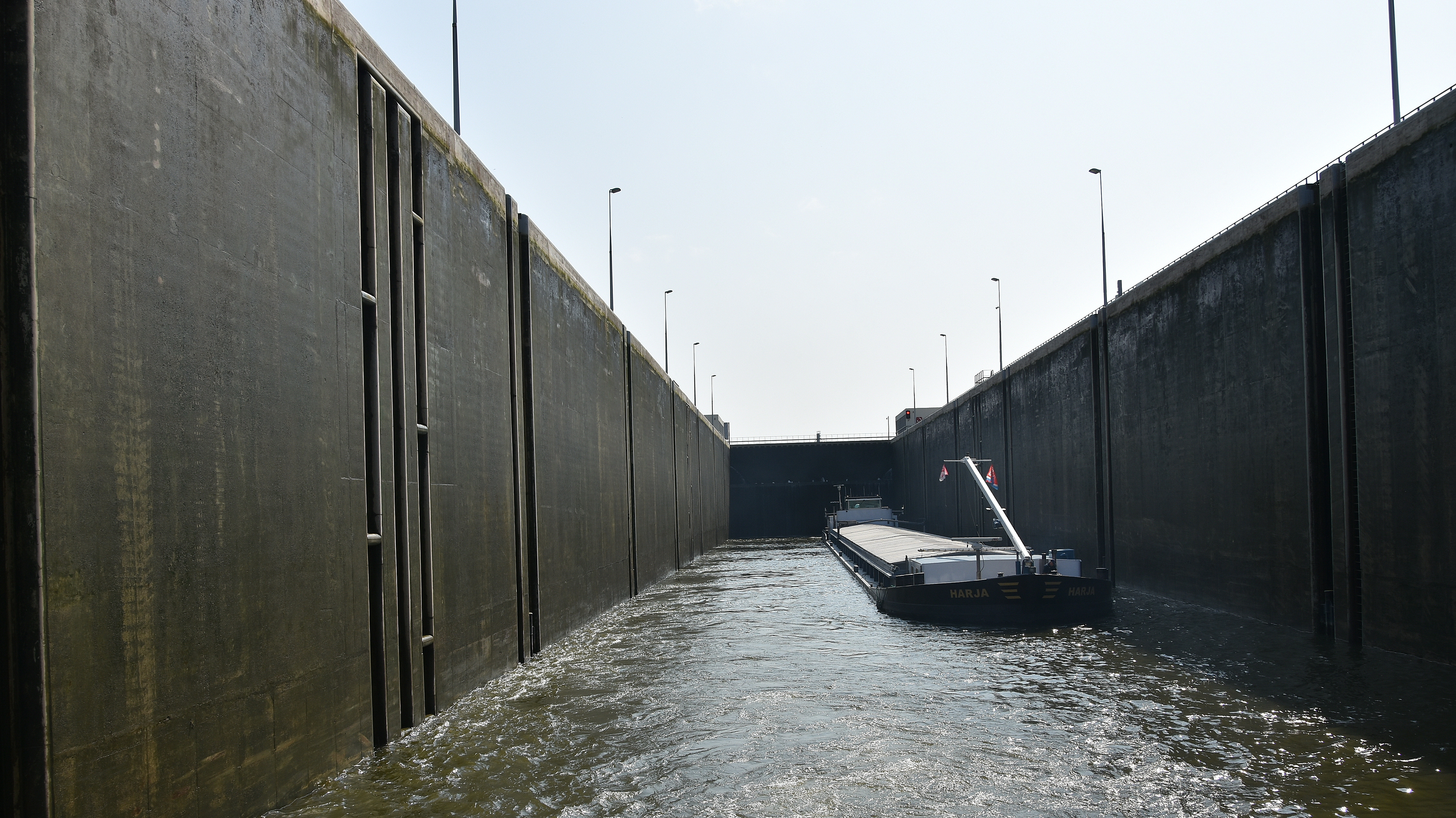 Sluiskolk Klein-Ternaaien 28-08-2018 14-56-25 This photo of immovable heritage has been taken in the Walloon Region